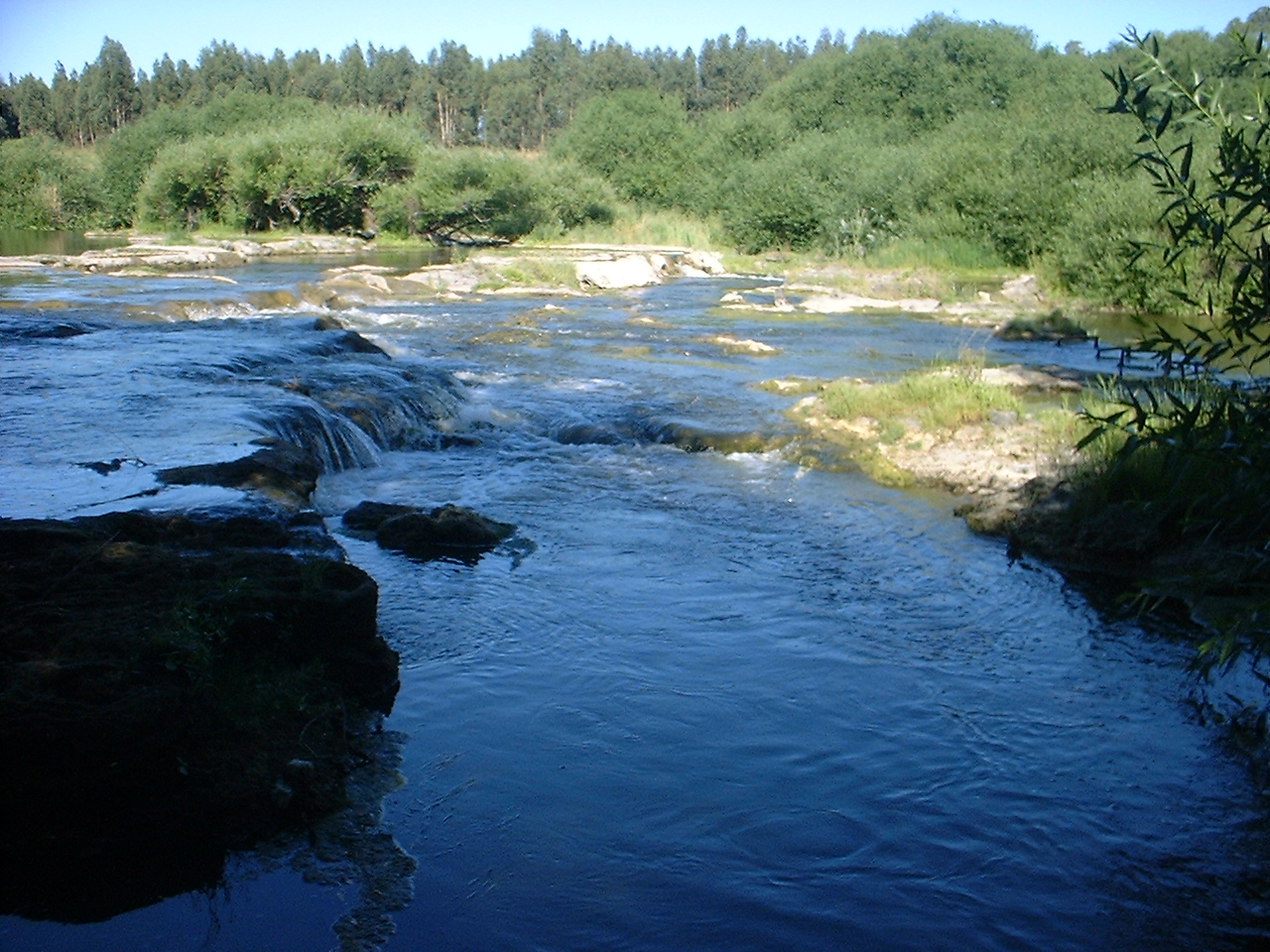 A 16 km río arriba del Quequén Grande, se formaron unas cascadas naturales, que atrae a gran cantidad de turistas. En el lugar se pueden hacer picnic, además de ser un buen lugar para la pesca. Author: David Vazquez